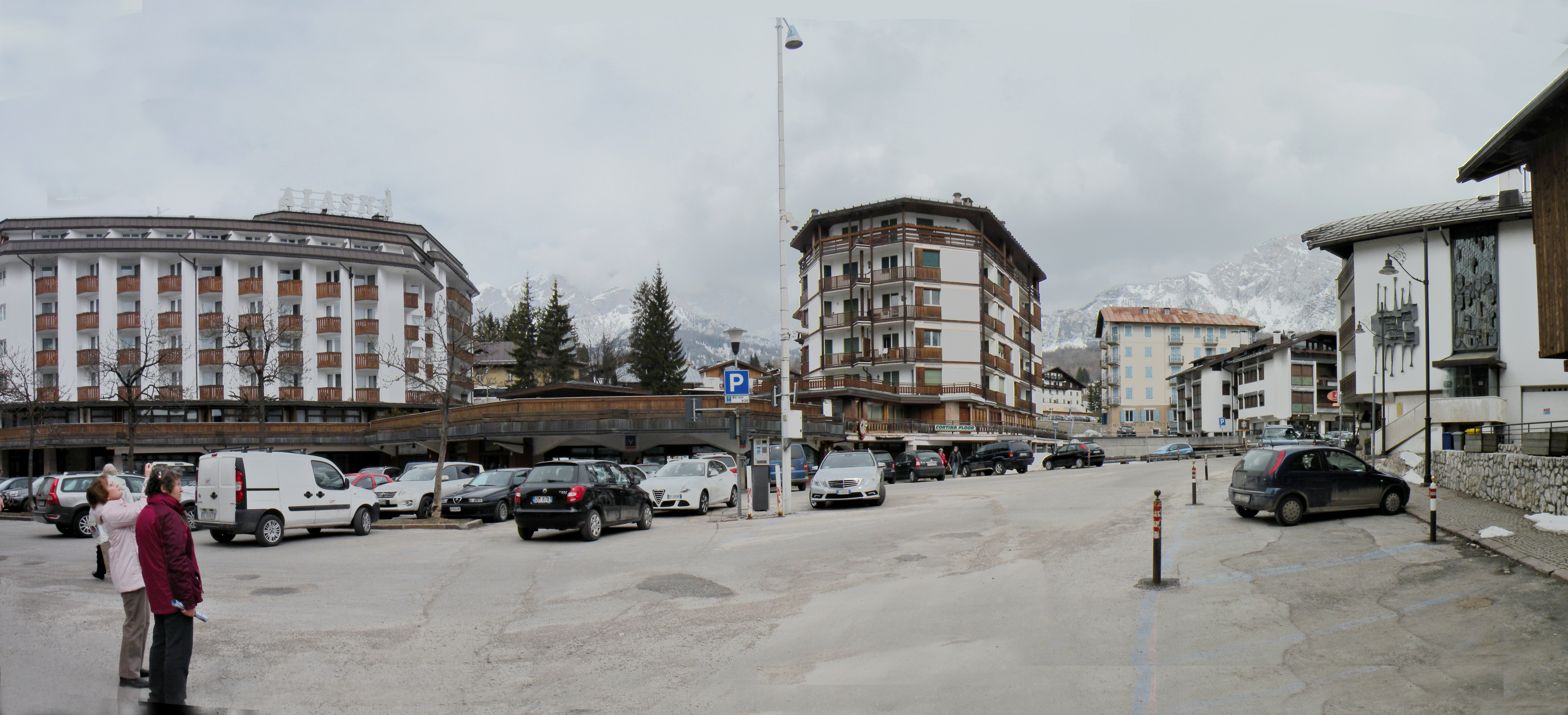 Кортина д Ампеццо. Одна из центральных улиц - виа Маркони